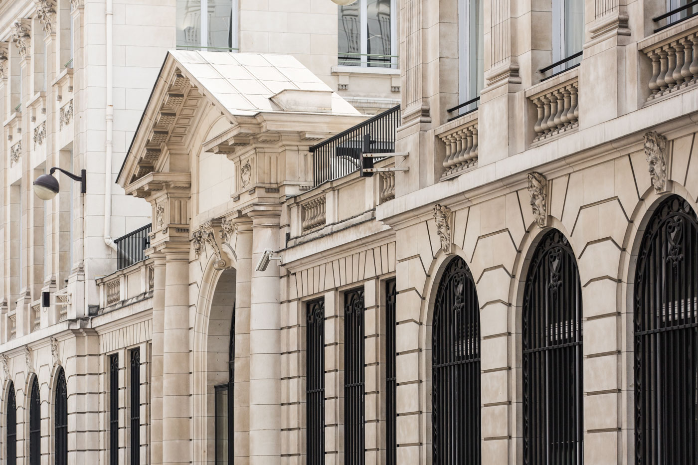 Photo de la façade du 1, rue d'Astorg, dans le 8ème arrondissement de Paris (France)